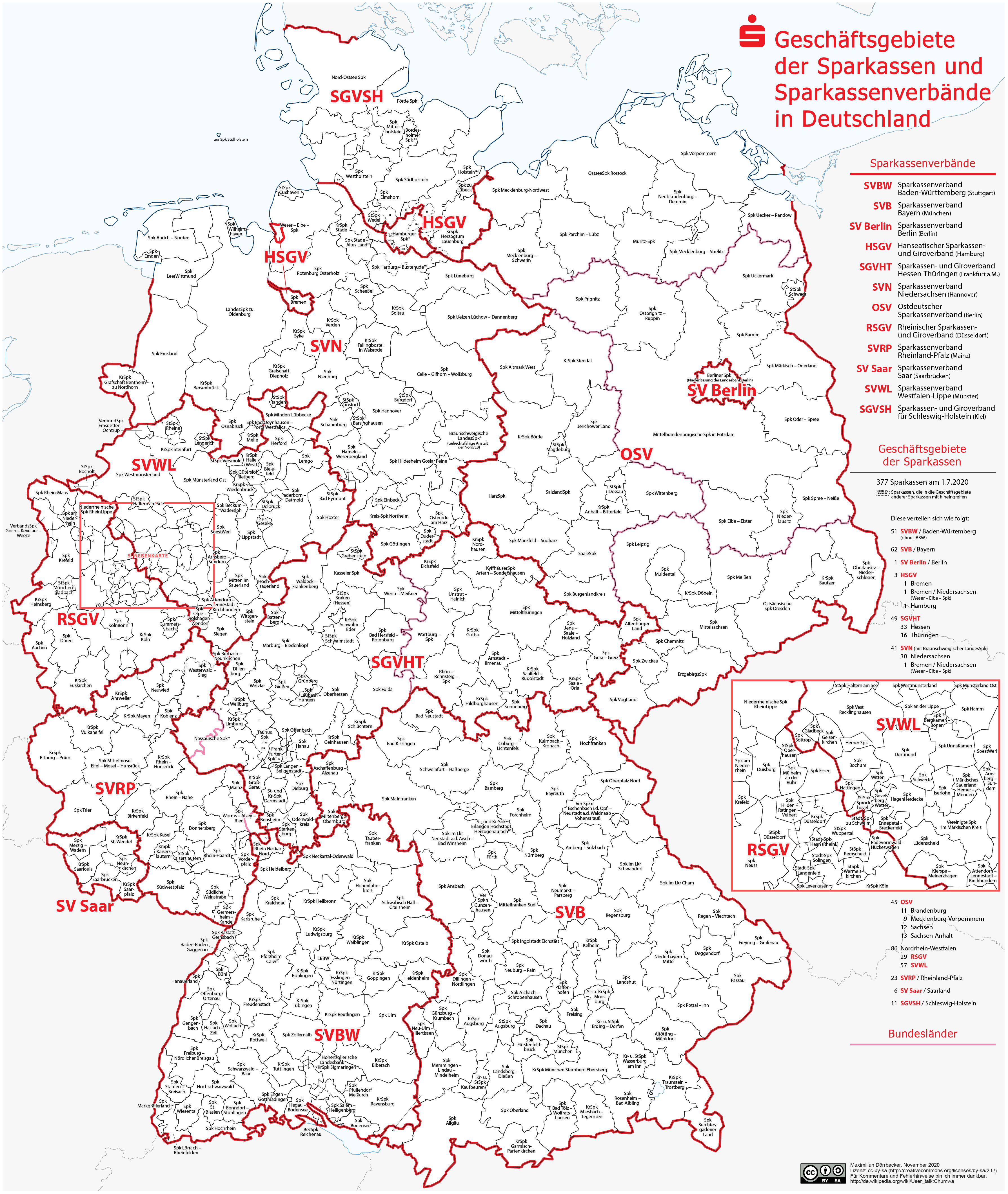 Geschäftsgebiete der Sparkassen und Sparkassenverbände in Deutschland (Karte)